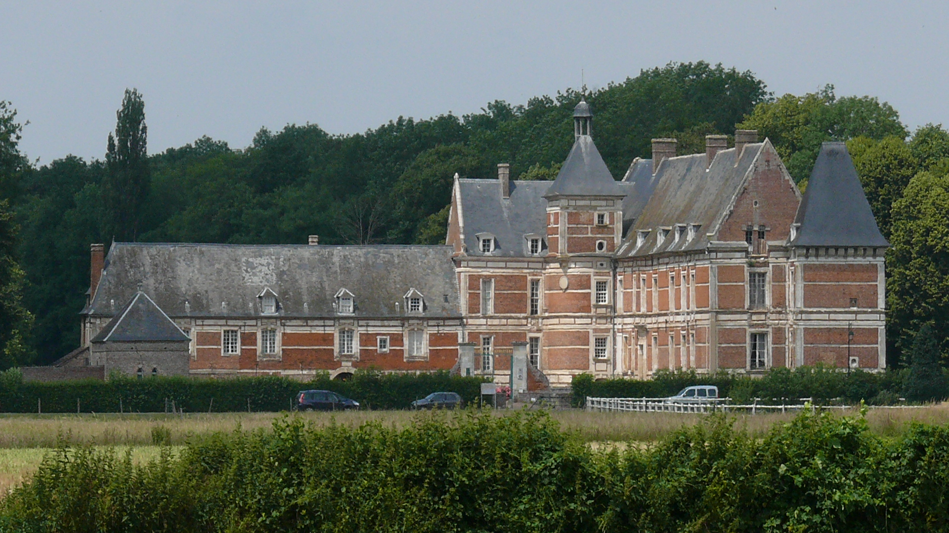 Vue générale du Château de Troissereaux (Oise)